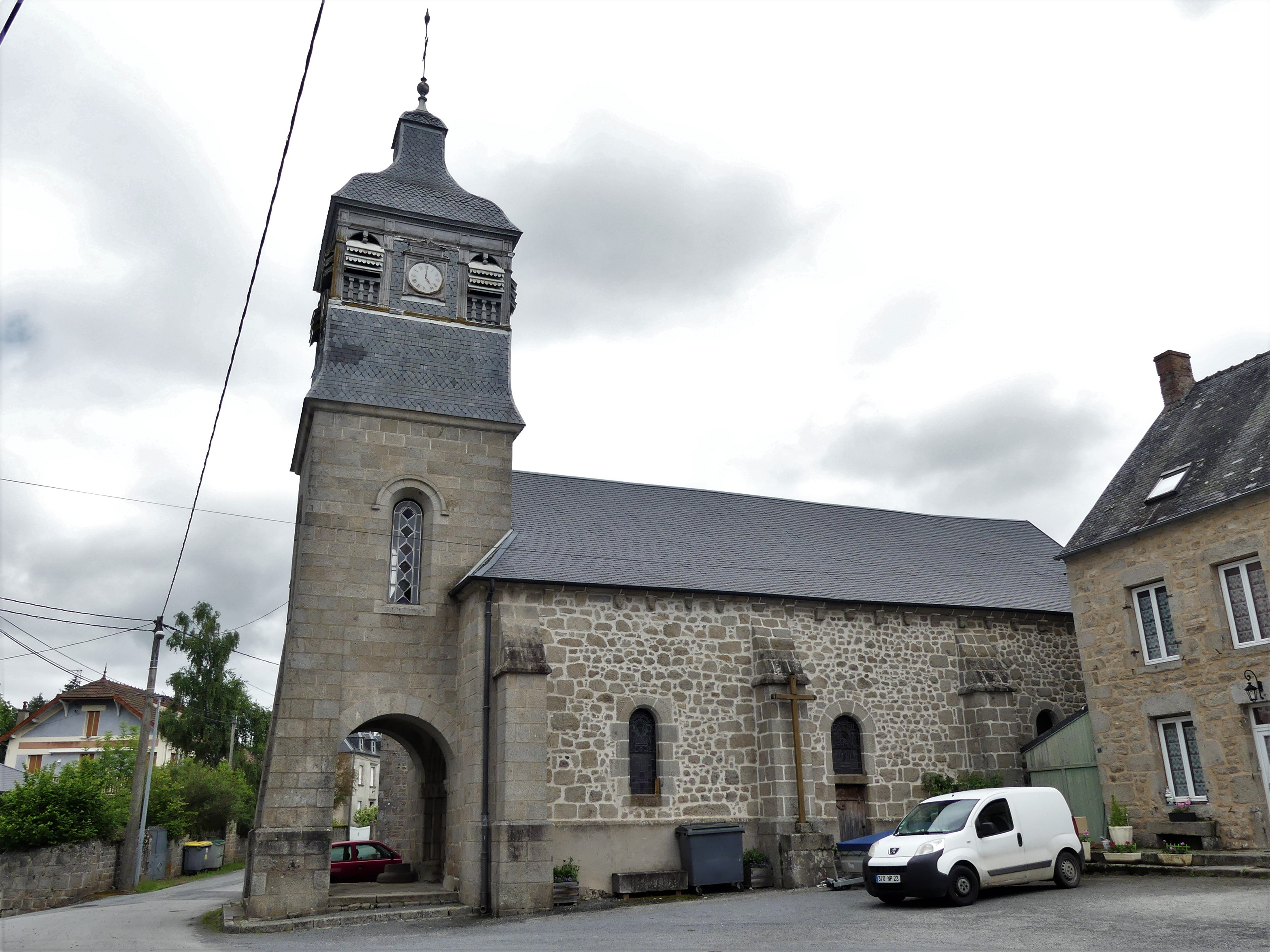 L'église de Saint-Domet, Creuse, France.